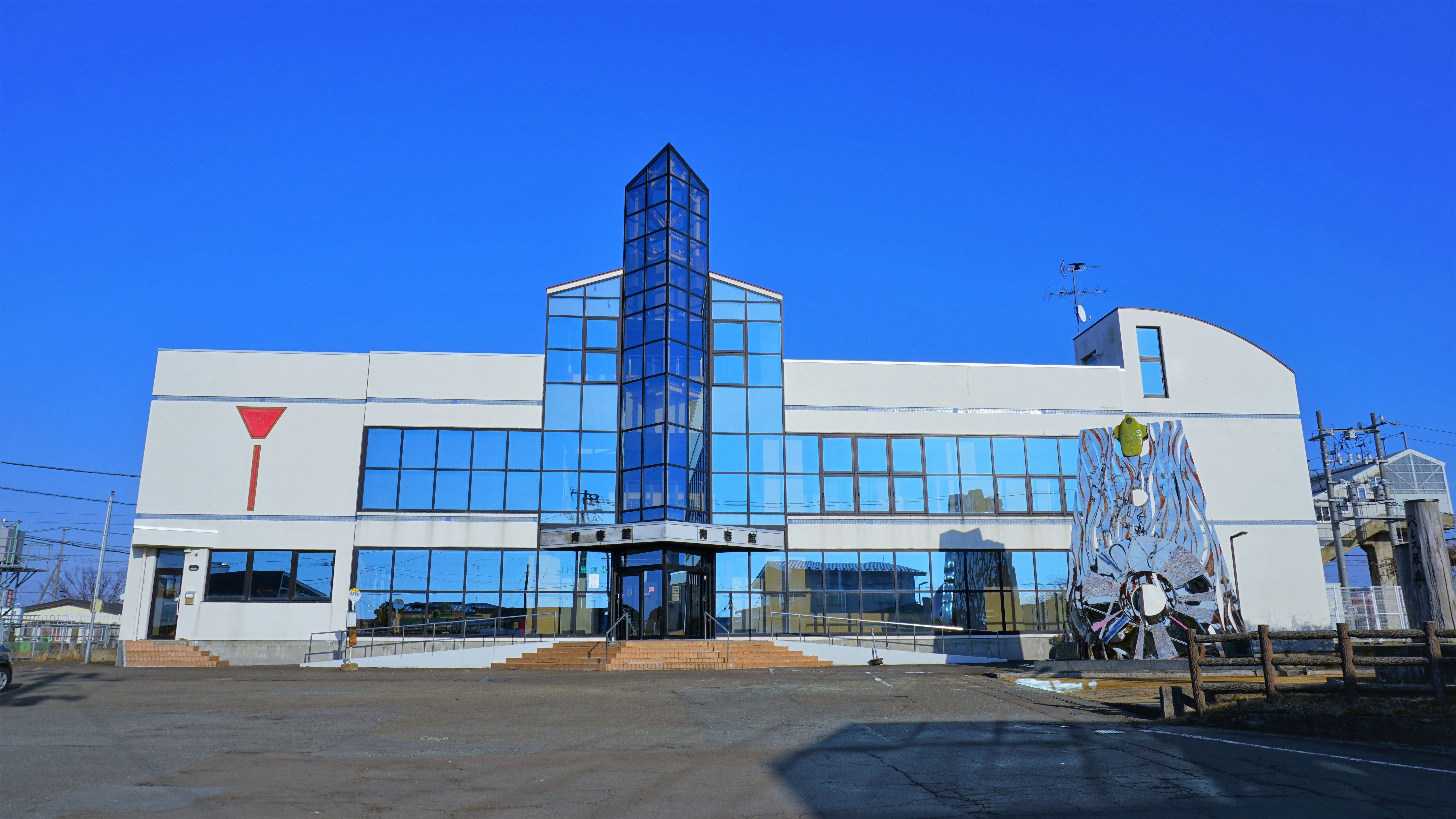 奥羽本線 鹿渡駅（秋田県山本郡三種町）